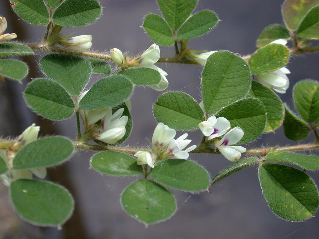 Lespedeza pilosa：ネコハギ 2006/09/23 和歌山県田辺市：Tanabe City. Wakayama Pref. Japan